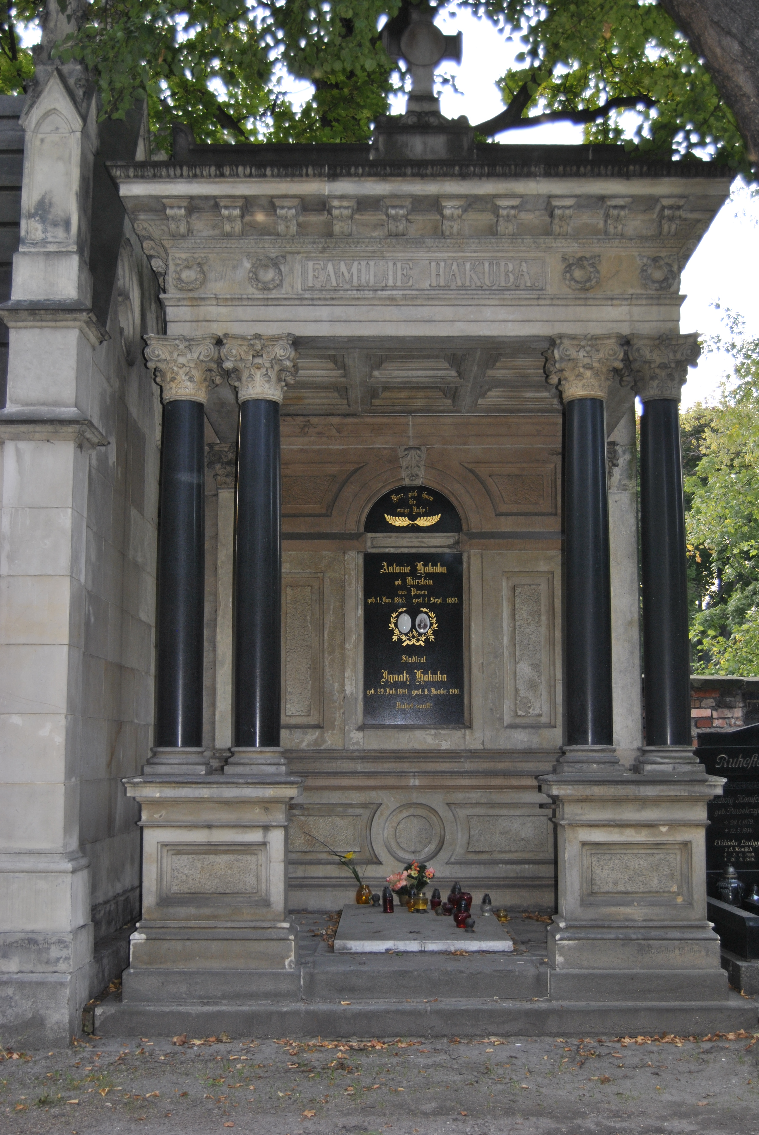 Bytom, mauzoleum Hakuby, kon. XIX